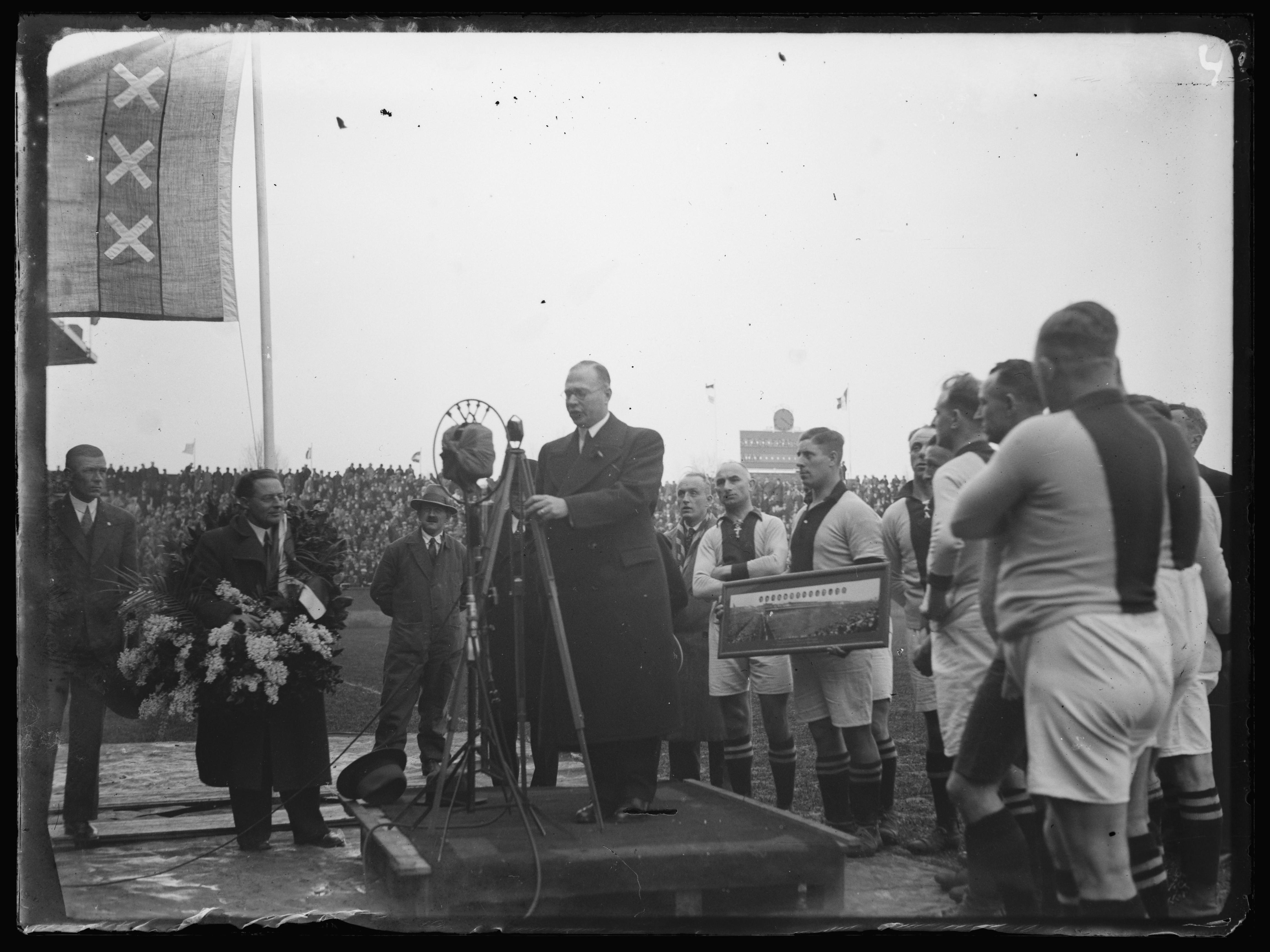 Beschrijving Ajax, opening van het nieuwe Ajax stadion De Meer, Middenweg 401 Voorzitter M. Koolhaas spreekt Daan Roodenburgh links (met krans) toe. Rechts staan oud-ajacieden klaar om een kampioensfoto uit de jaren 1916-1921 te overhandigen. Documenttype foto Vervaardiger Onbekend Anoniem Collectie Collectie glasnegatieven fotopersbureaus Datering 1934 Geografische naam Middenweg Gebouw Ajax Stadion (De Meer) Inventarissen Afbeeldingsbestand ANWG00586000001